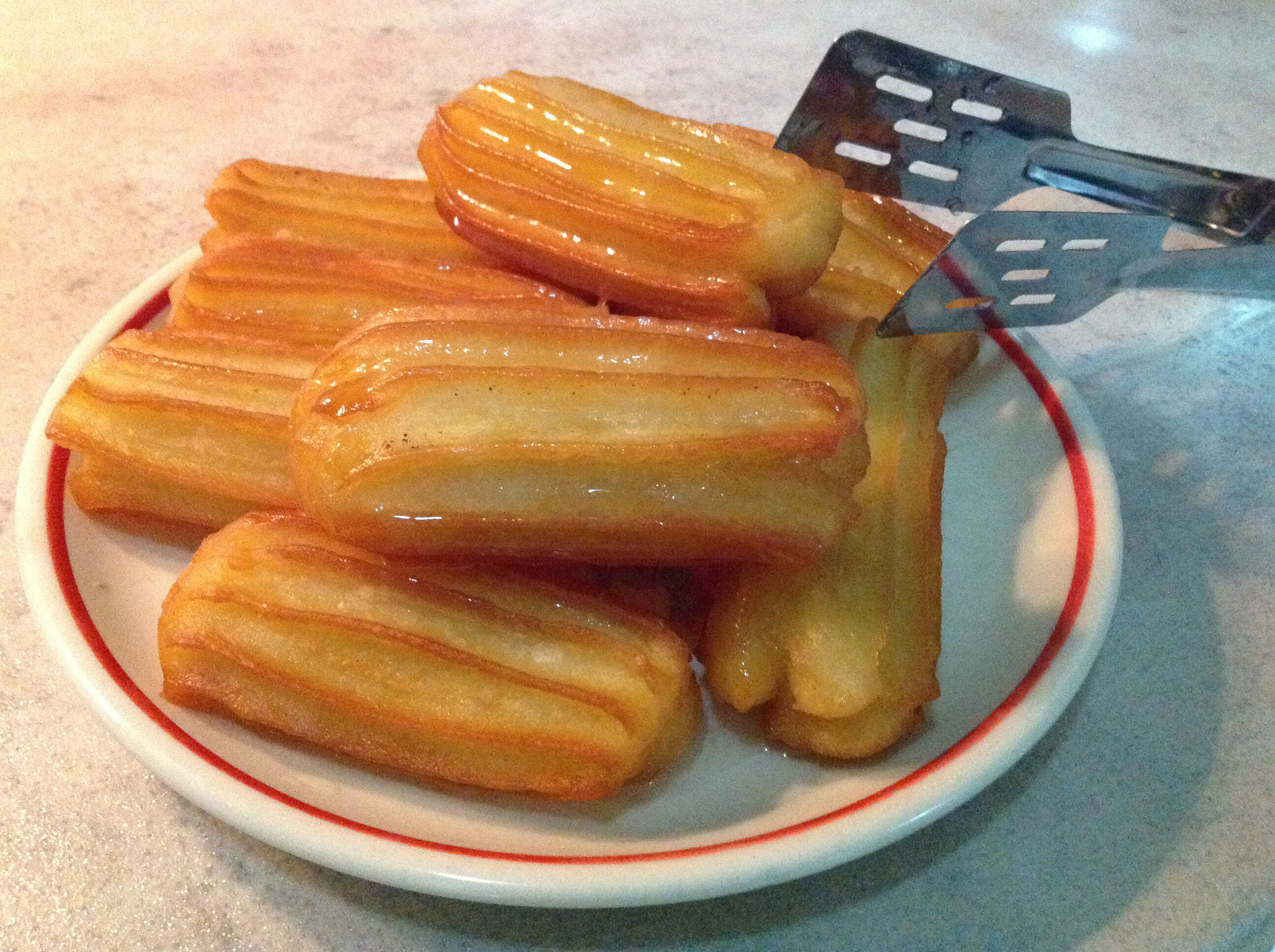 Толумбите се едени од најтрадициналните македонски десерти.